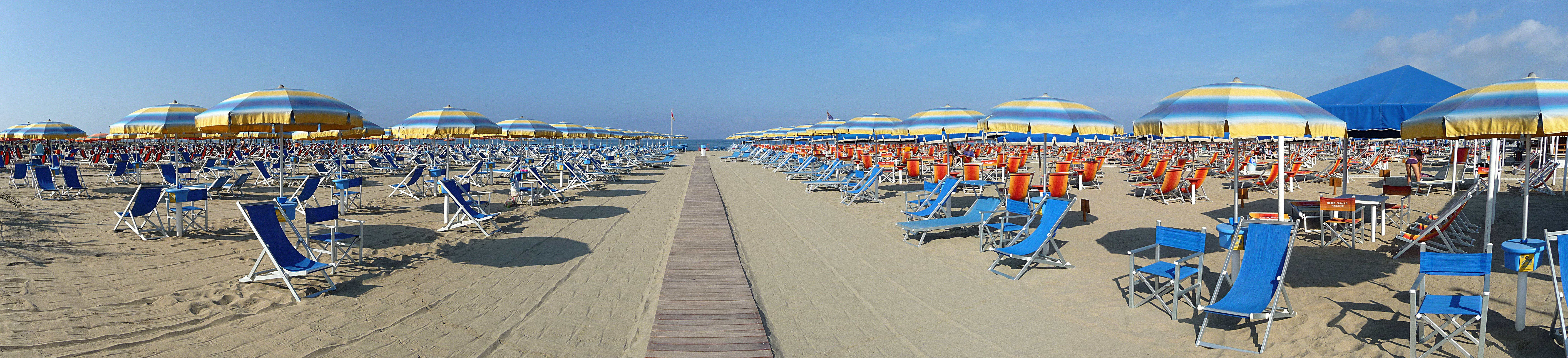 Panoramica del Bagno Roma di Viareggio